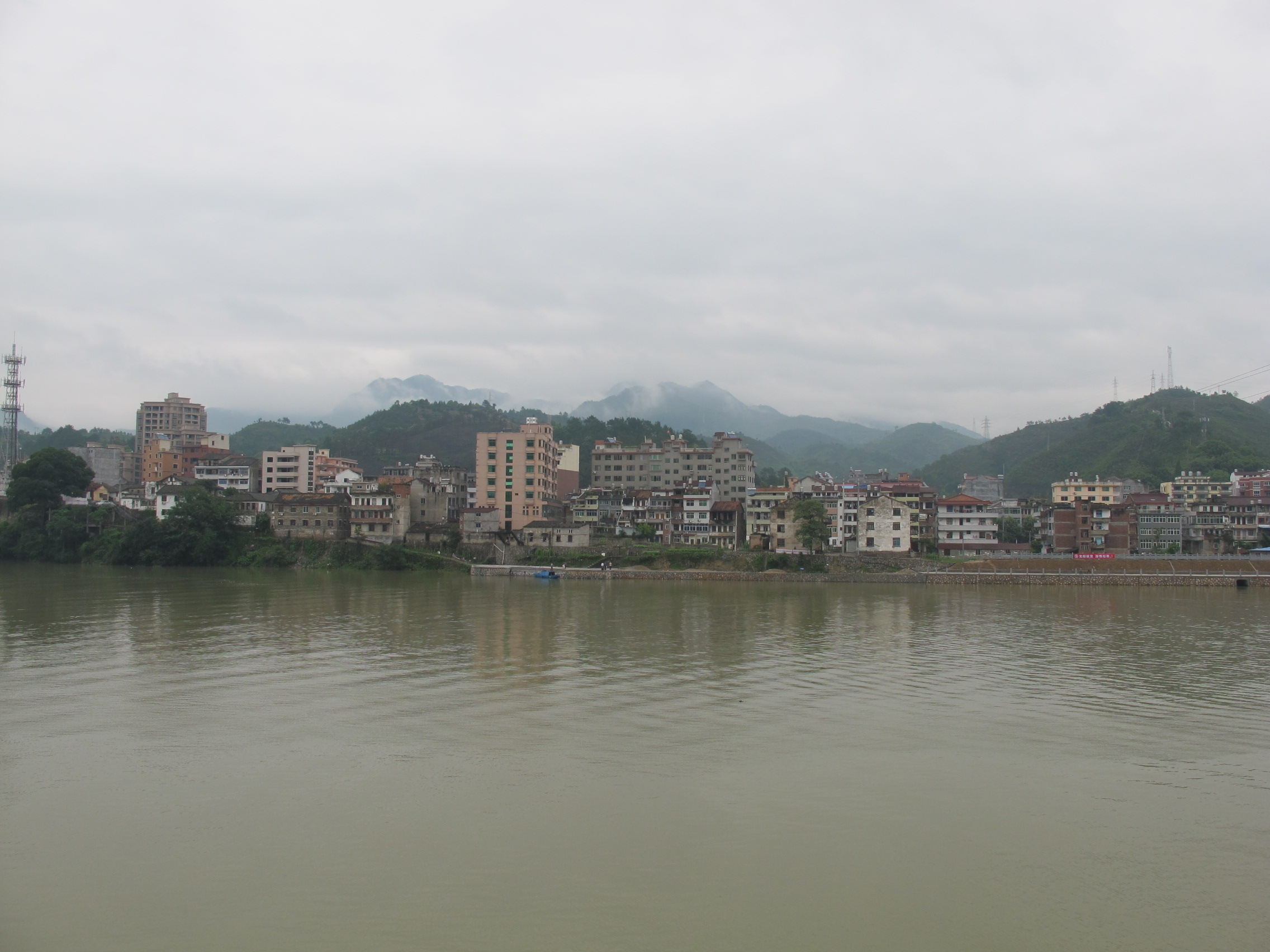 对岸的青田县船寮镇